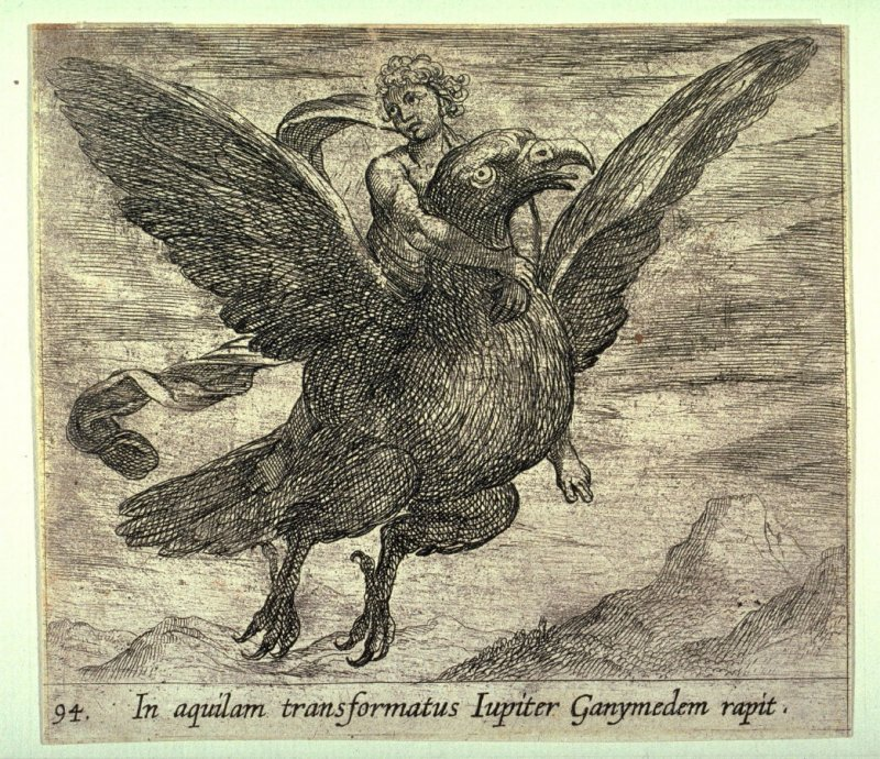 Illustrazione per le Metamorfosi di Ovidio